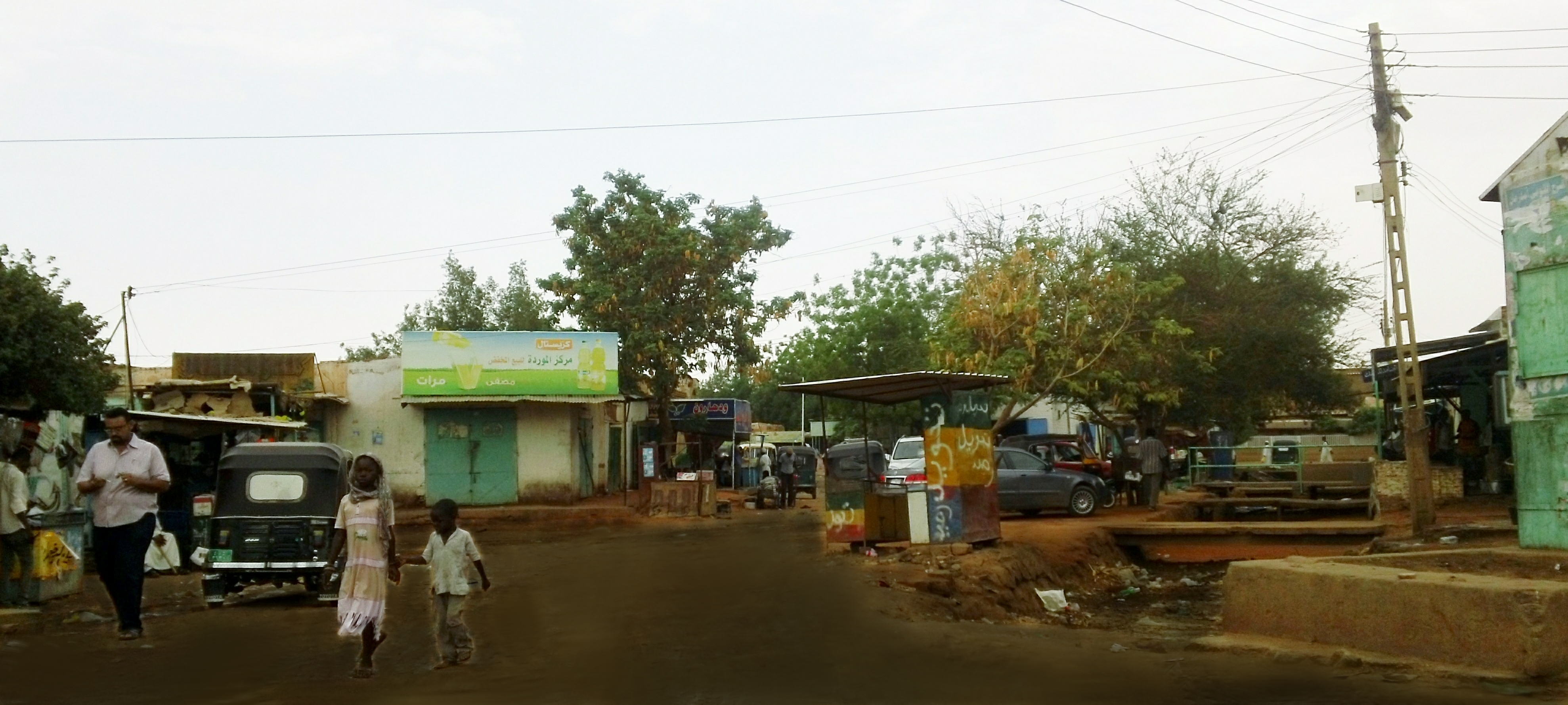 Almorada market - Omdurman - Sudan